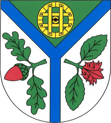 Heřmanov, okres Děčín, znak